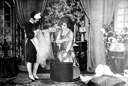 Maria Jacobini nel film muto italiano Il carnevale di Venezia, regia di Mario Almirante, produz SASP Pittaluga, Torino, 1928